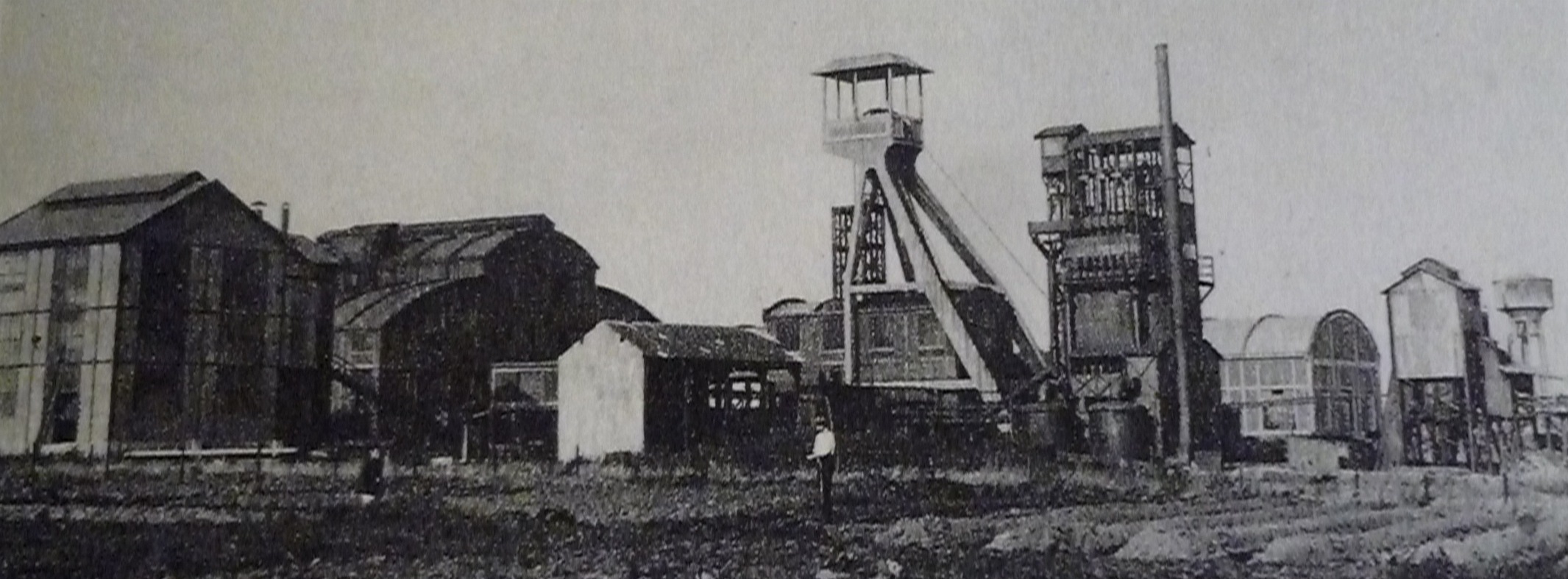 La fosse n° 3 ou Ewbank de la Compagnie des mines de Vicoigne était un charbonnage constitué d'un seul puits situé à Raismes, Nord, Nord-Pas-de-Calais, France.